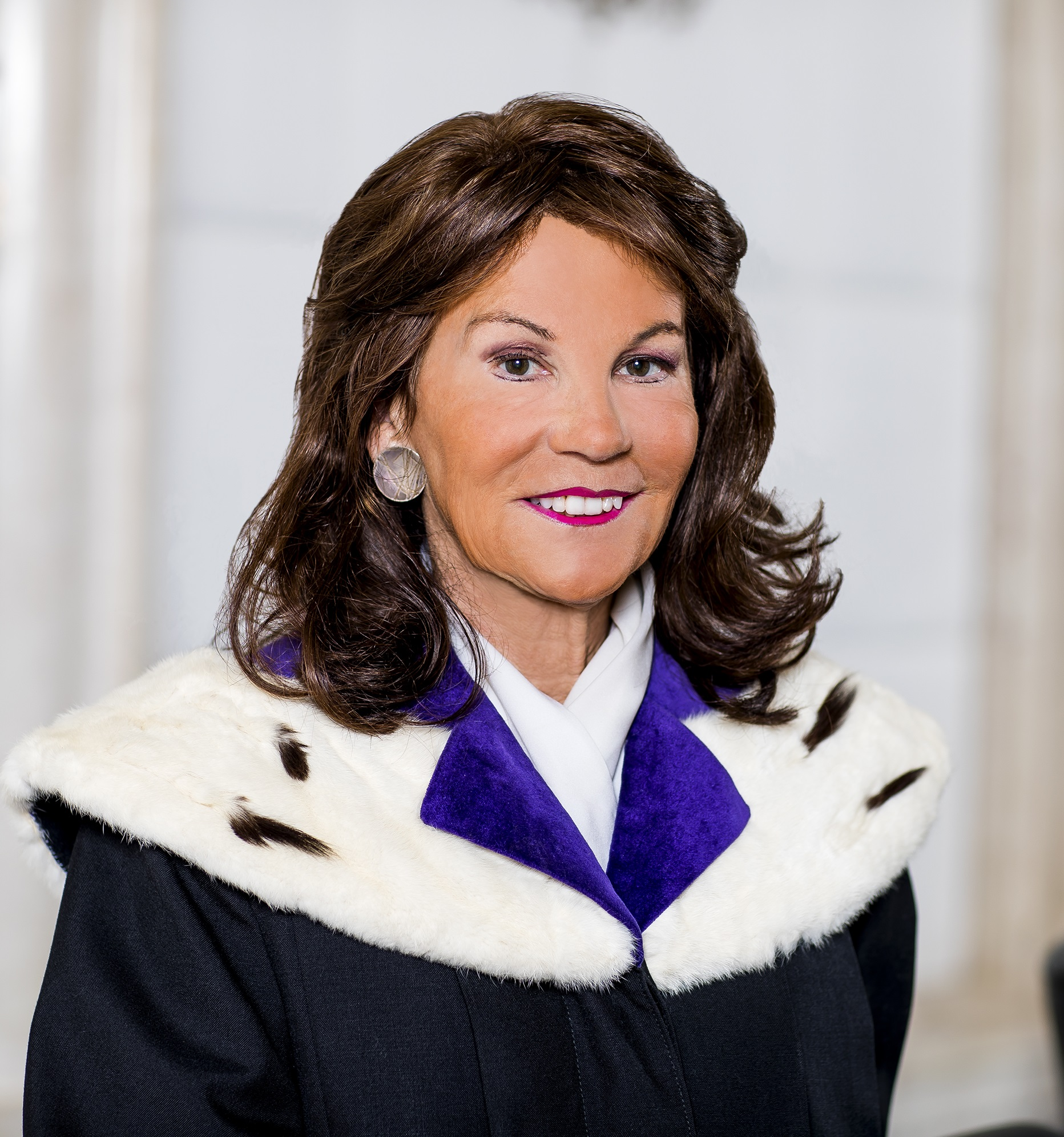 Dr. Brigitte Bierlein, Präsidentin des österreichischen Verfassungsgerichtshofs seit 2018.